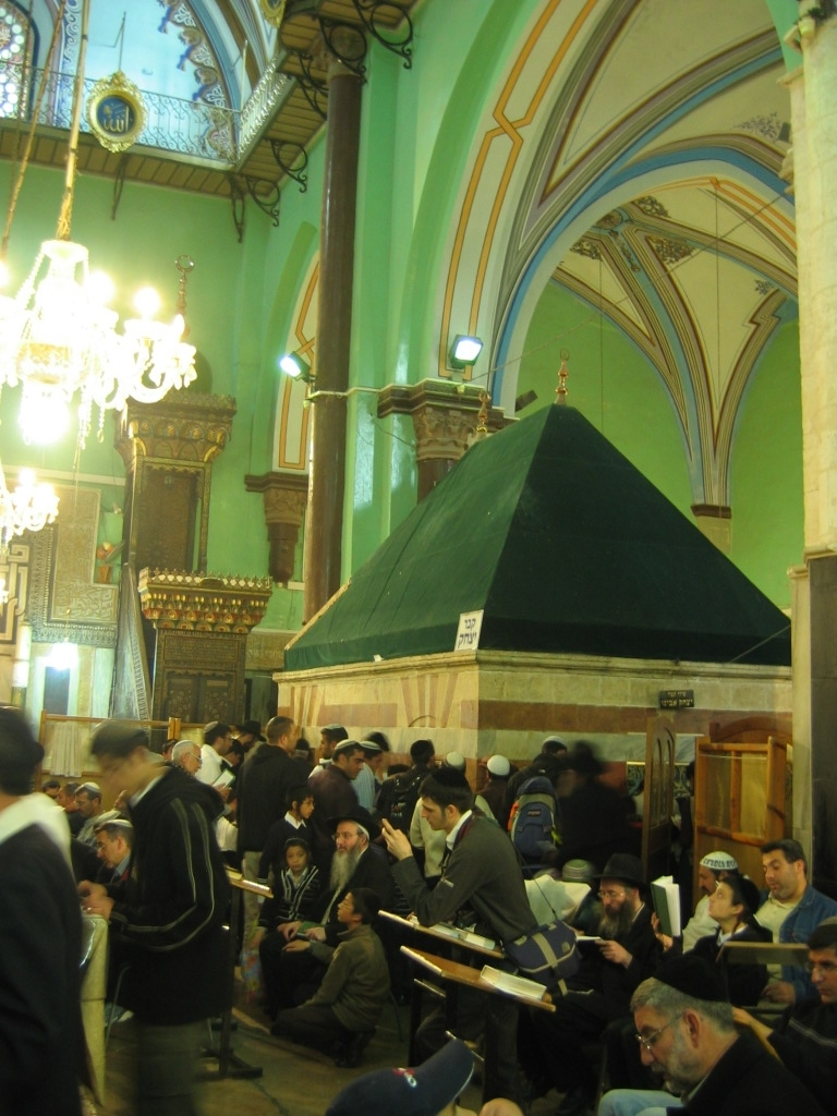 מערת המכפלה - אולם יצחק